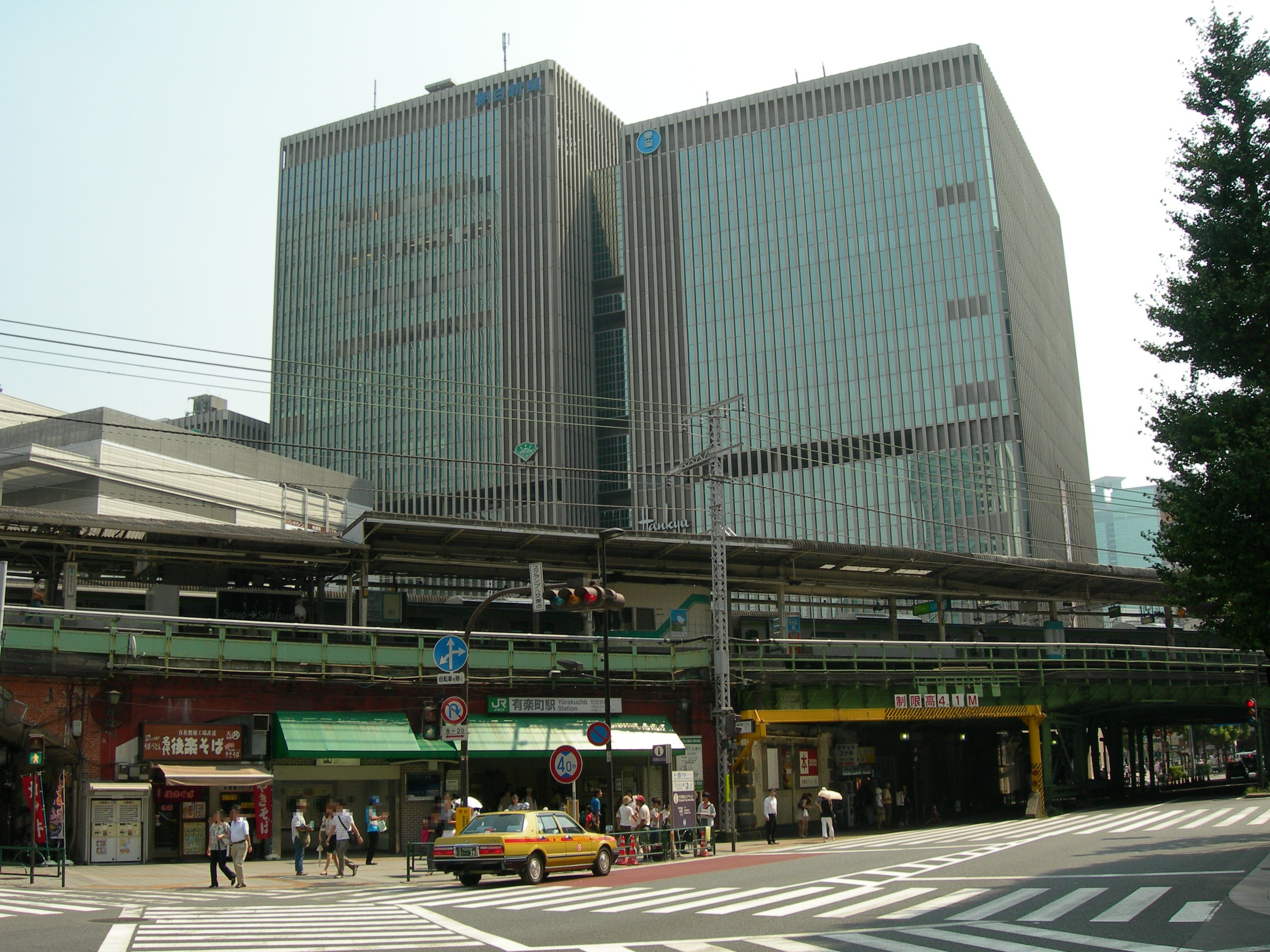 JR 有楽町駅 日比谷口